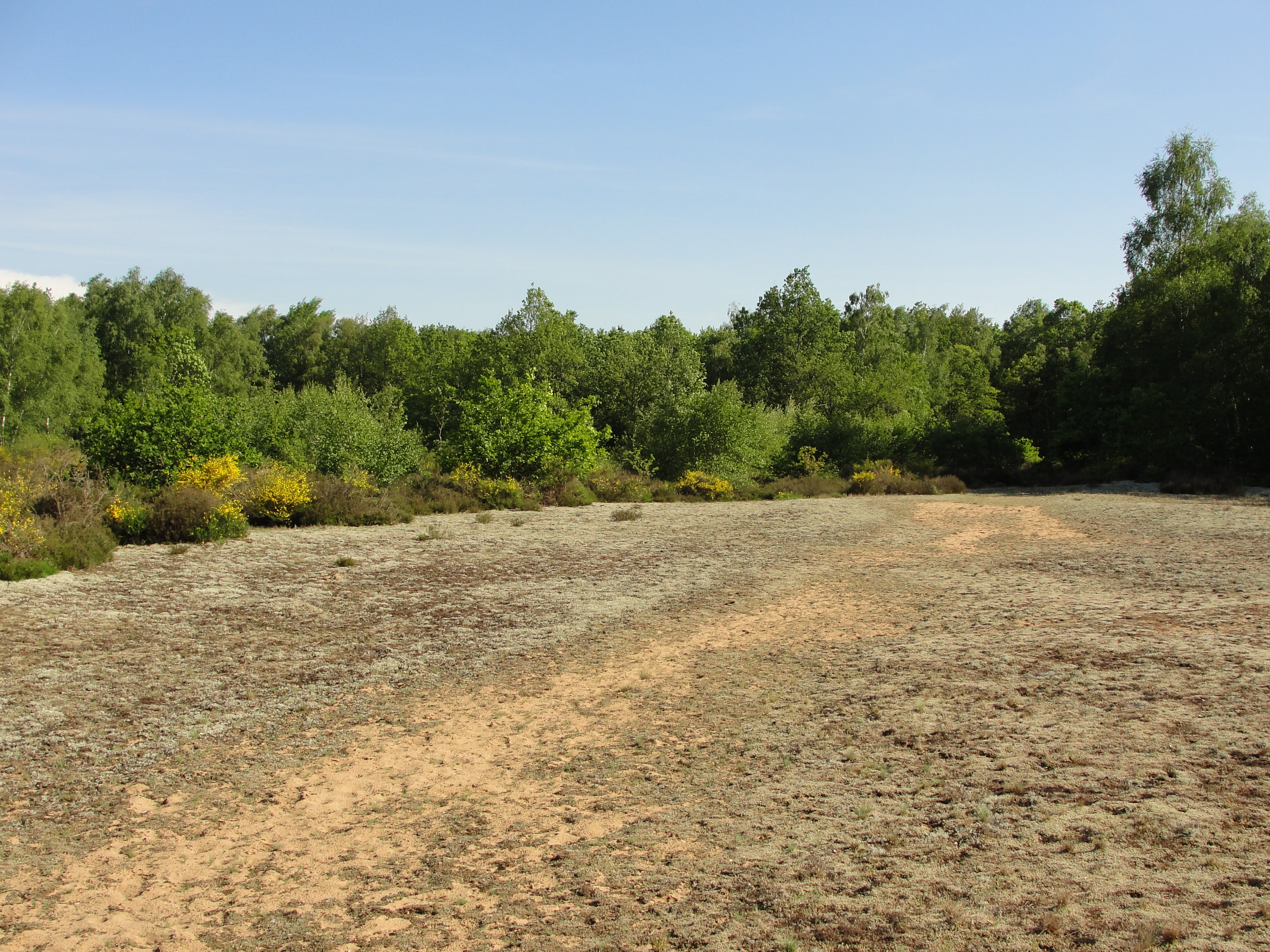 Réserve naturelle de la Truchère (Saône-et-Loire) - partie ouest et ses paysages de landes.